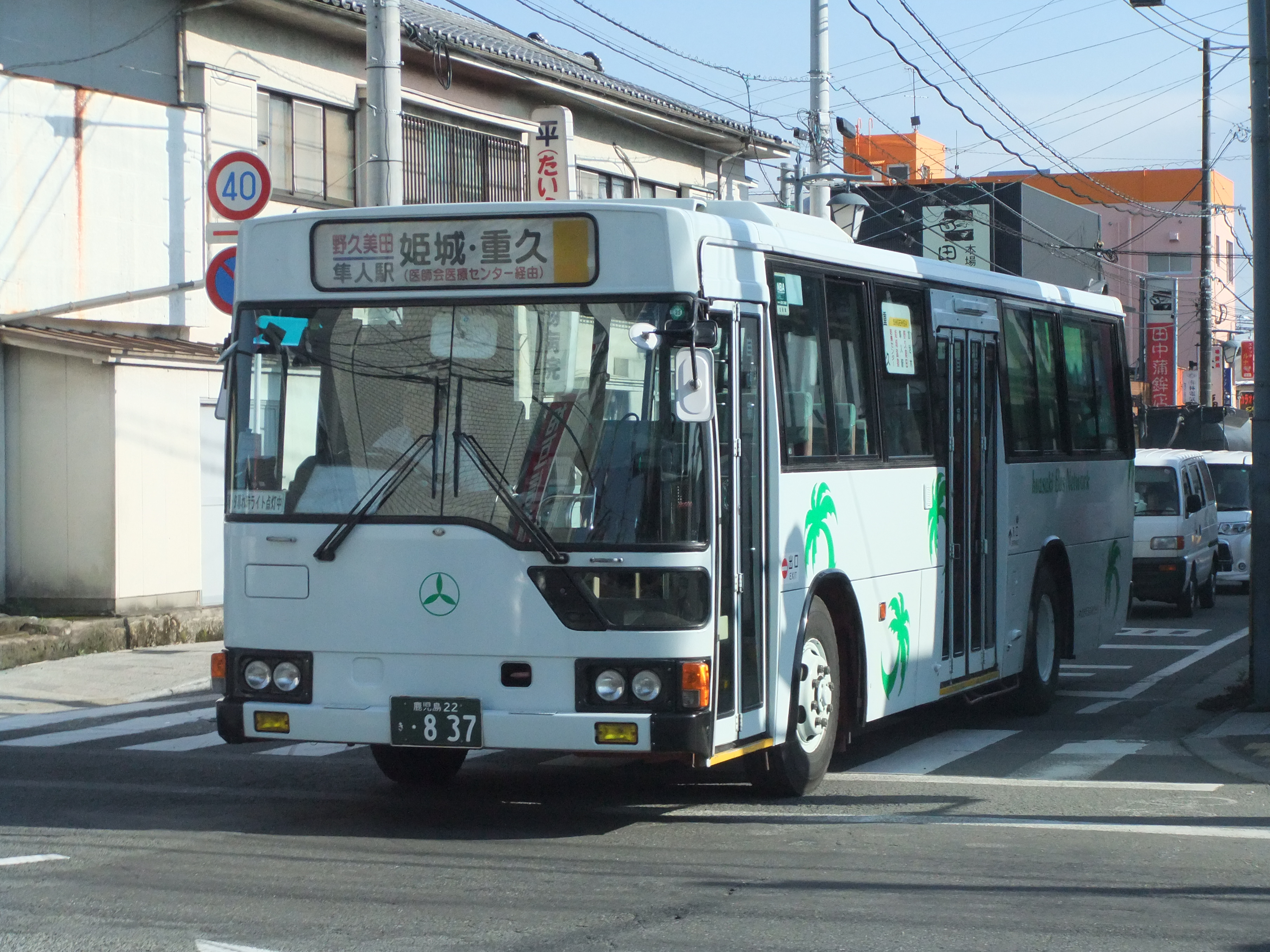 2013年8月撮影